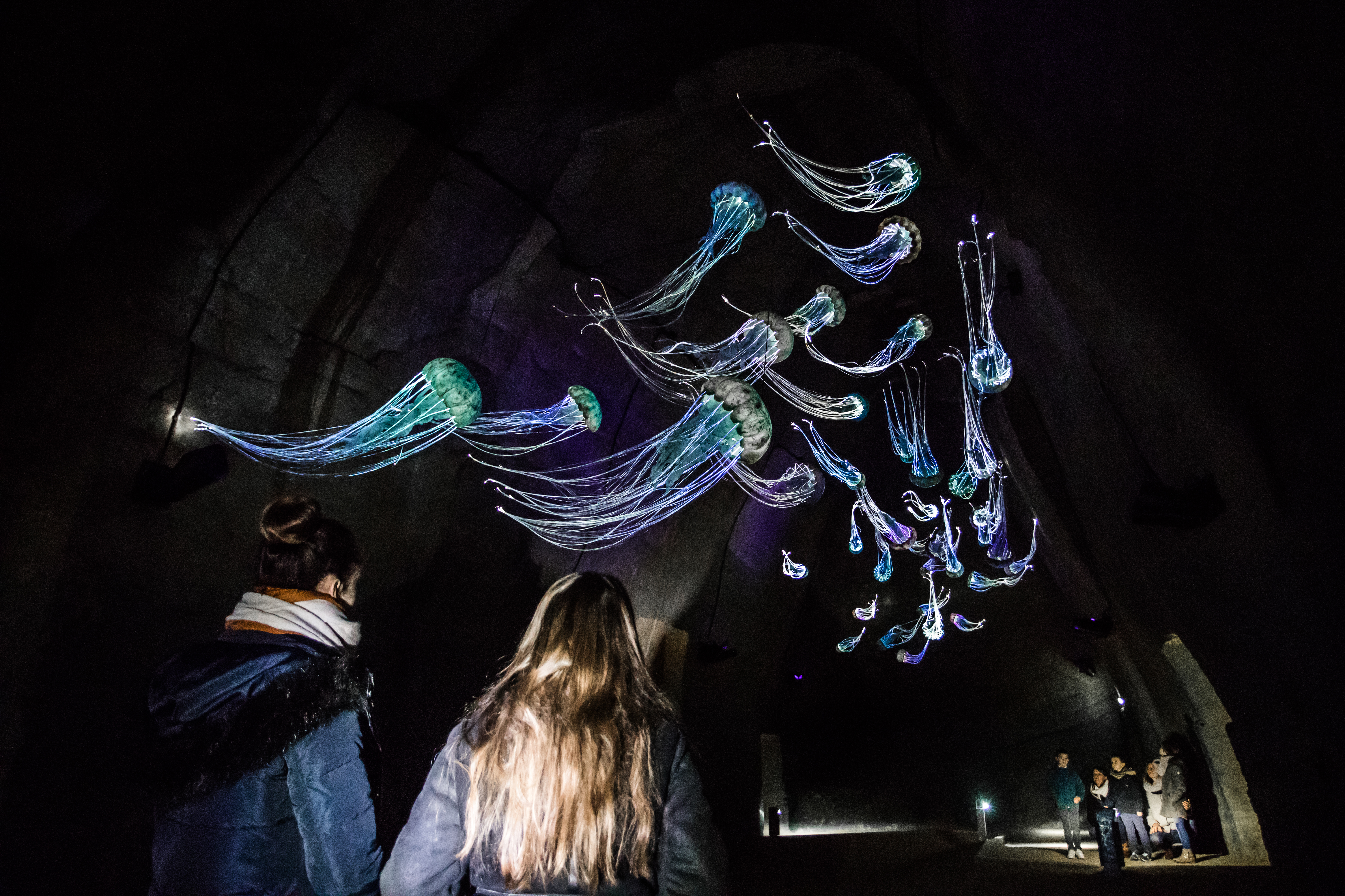 Image de la scénographie des méduses